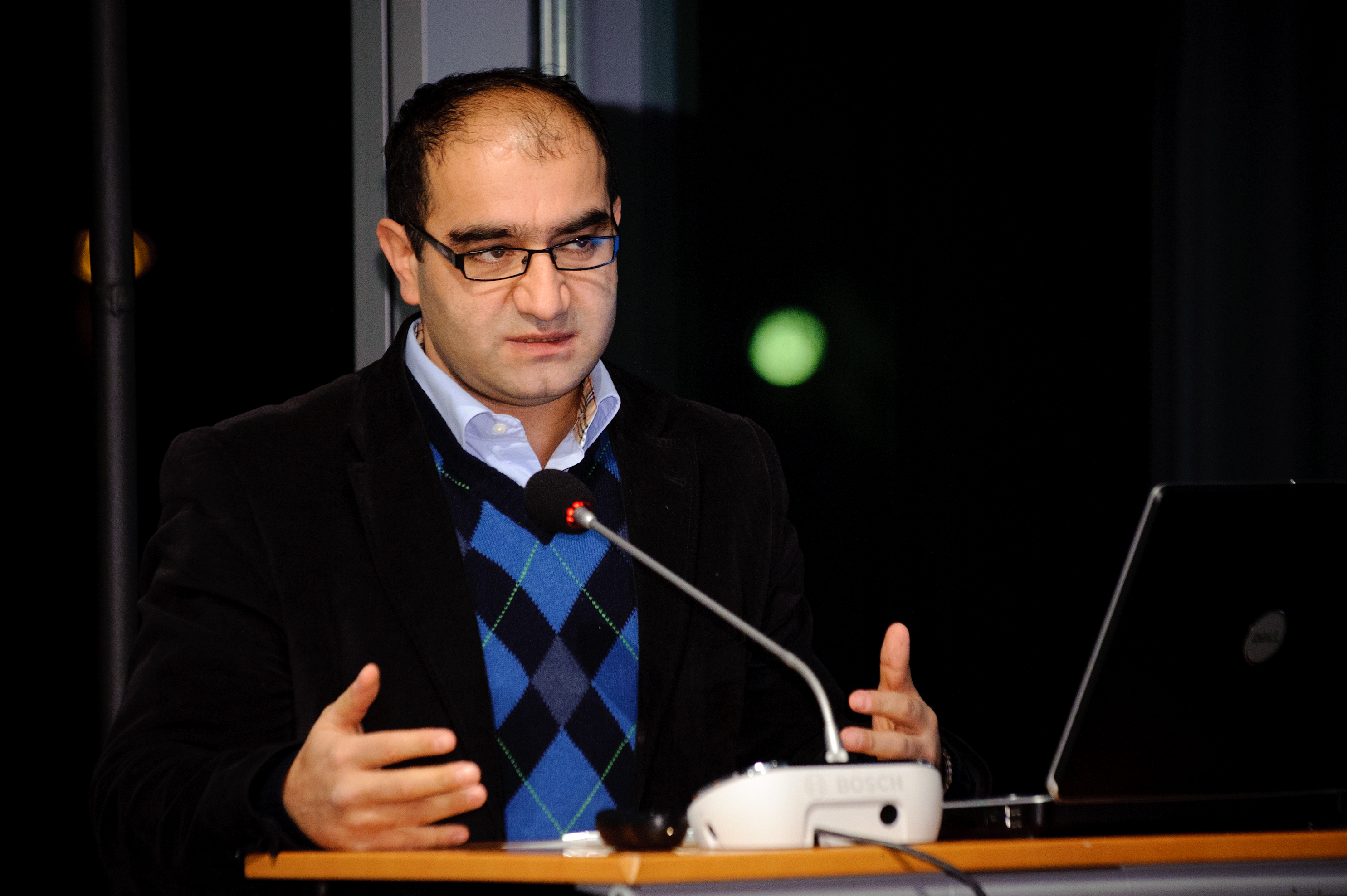 Özcan Mutlu (Bildungspol. Sprecher B90/Die Grünen im Abgeordnetenhaus Berlin) Foto: Stephan Röhl